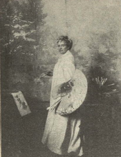 Elisabeth Warling i tidningen Idun 1916 (andra numret)